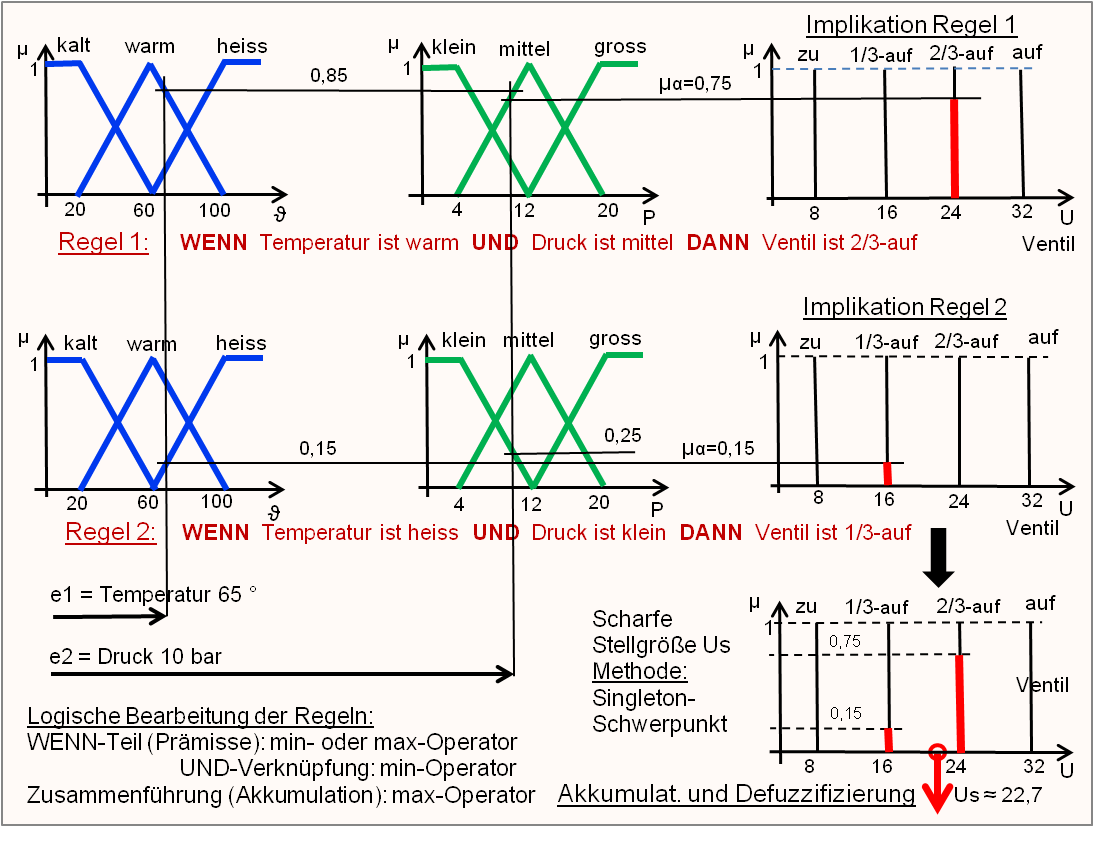 Signalflussdiagramm für einen Fuzzy-Controller mit 2 Grundmengen und Singletons